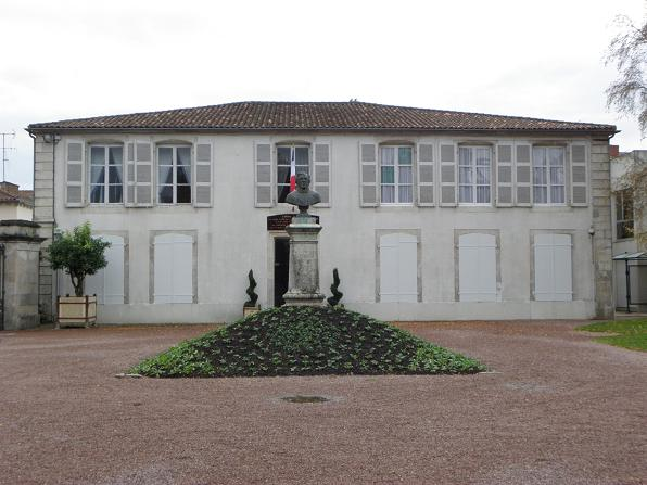 Hôtel de Ville de Luçon (85).